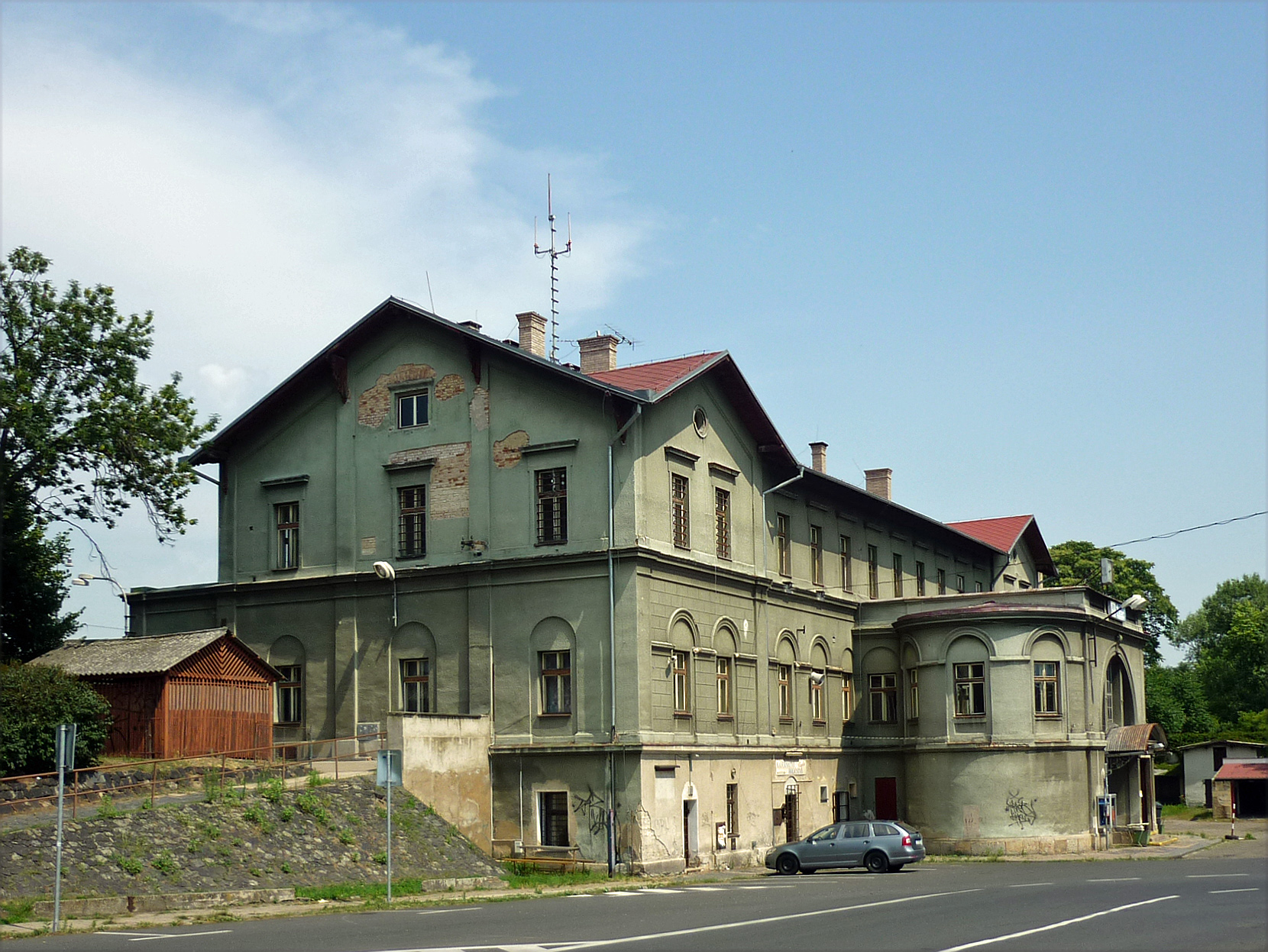 Hauptbahnhof Saaz (Hlavní nádraží Žatec)